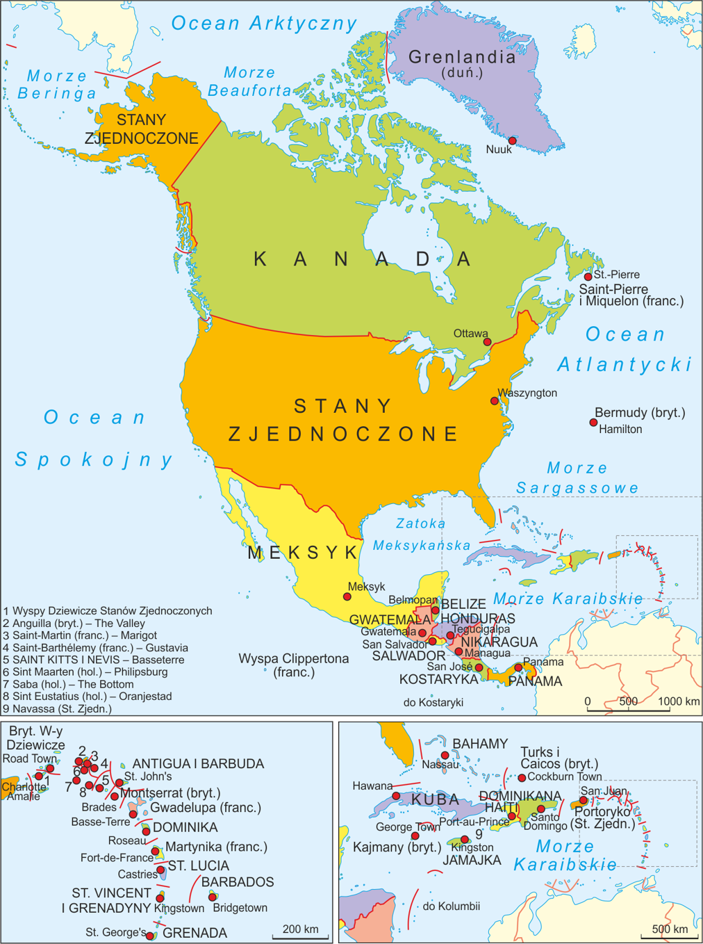 Mapa polityczna Ameryki Północnej. Autor: Aotearoa